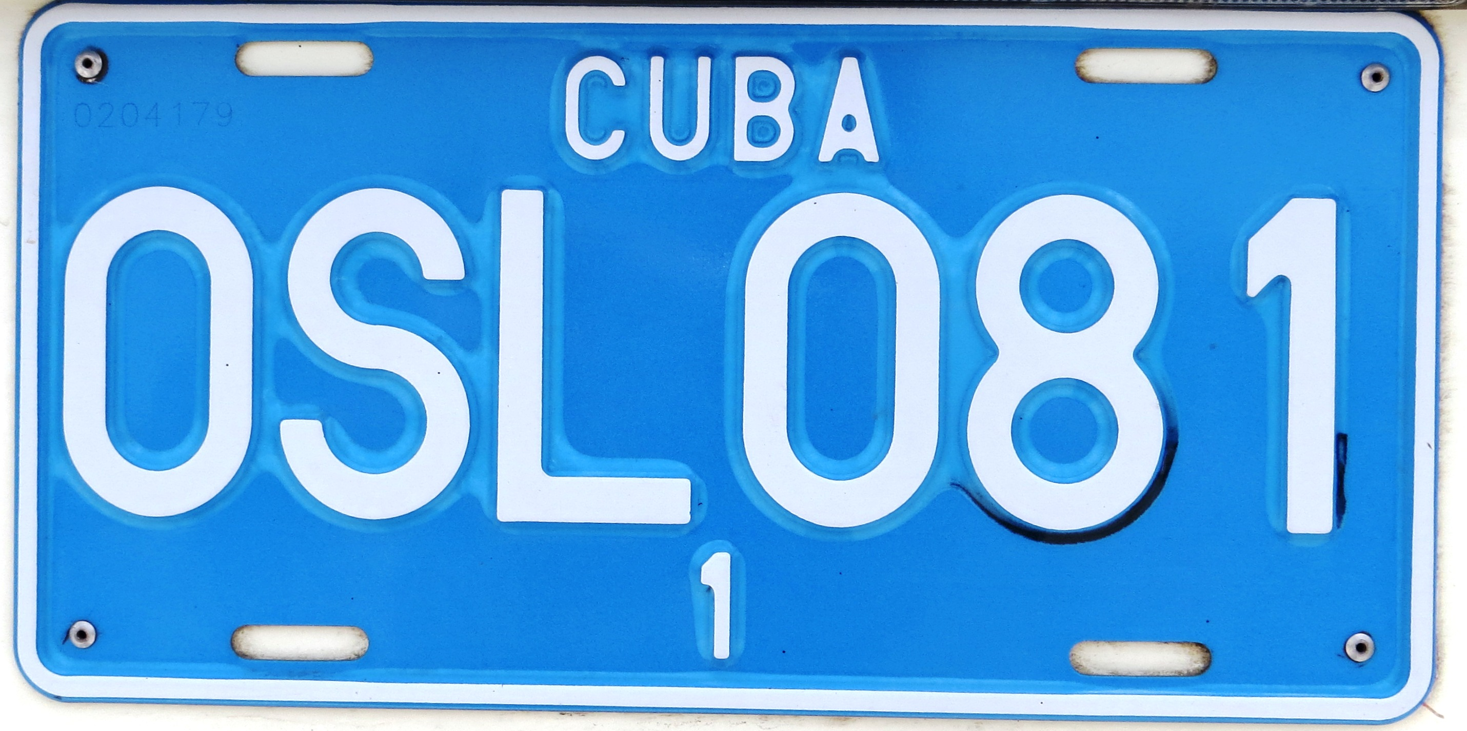 Kentekenplaat uit Cuba